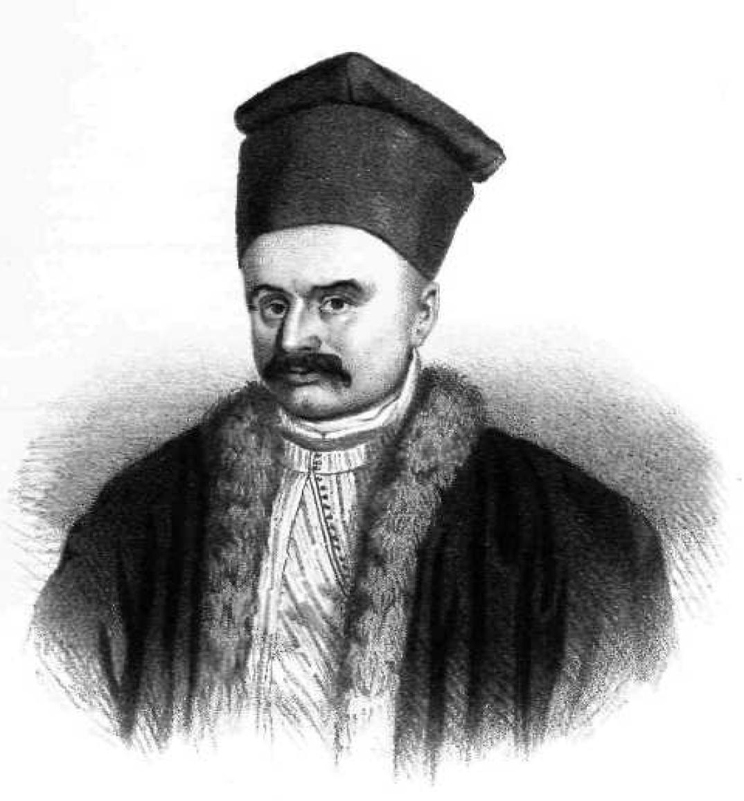 Griechischer Gelehrter, 19. Jahrhundert